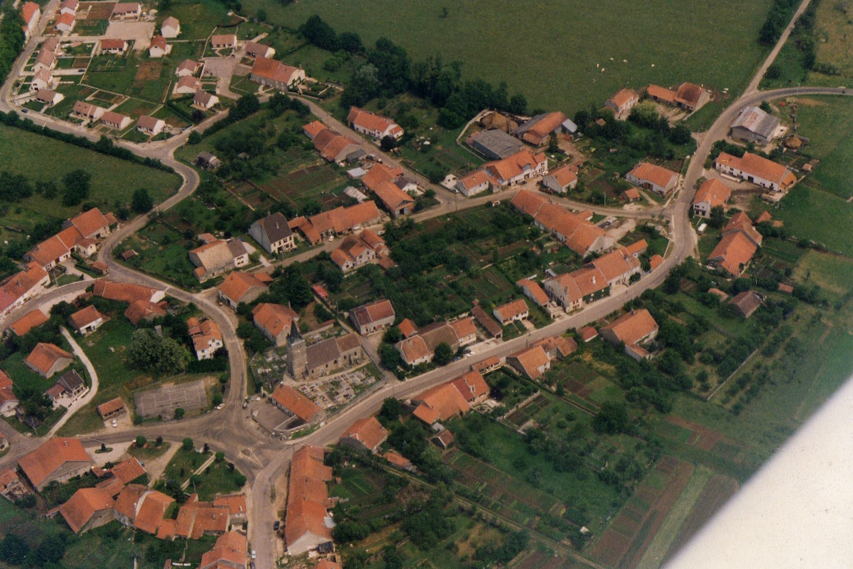 Heuilley-Cotton vue aérienne